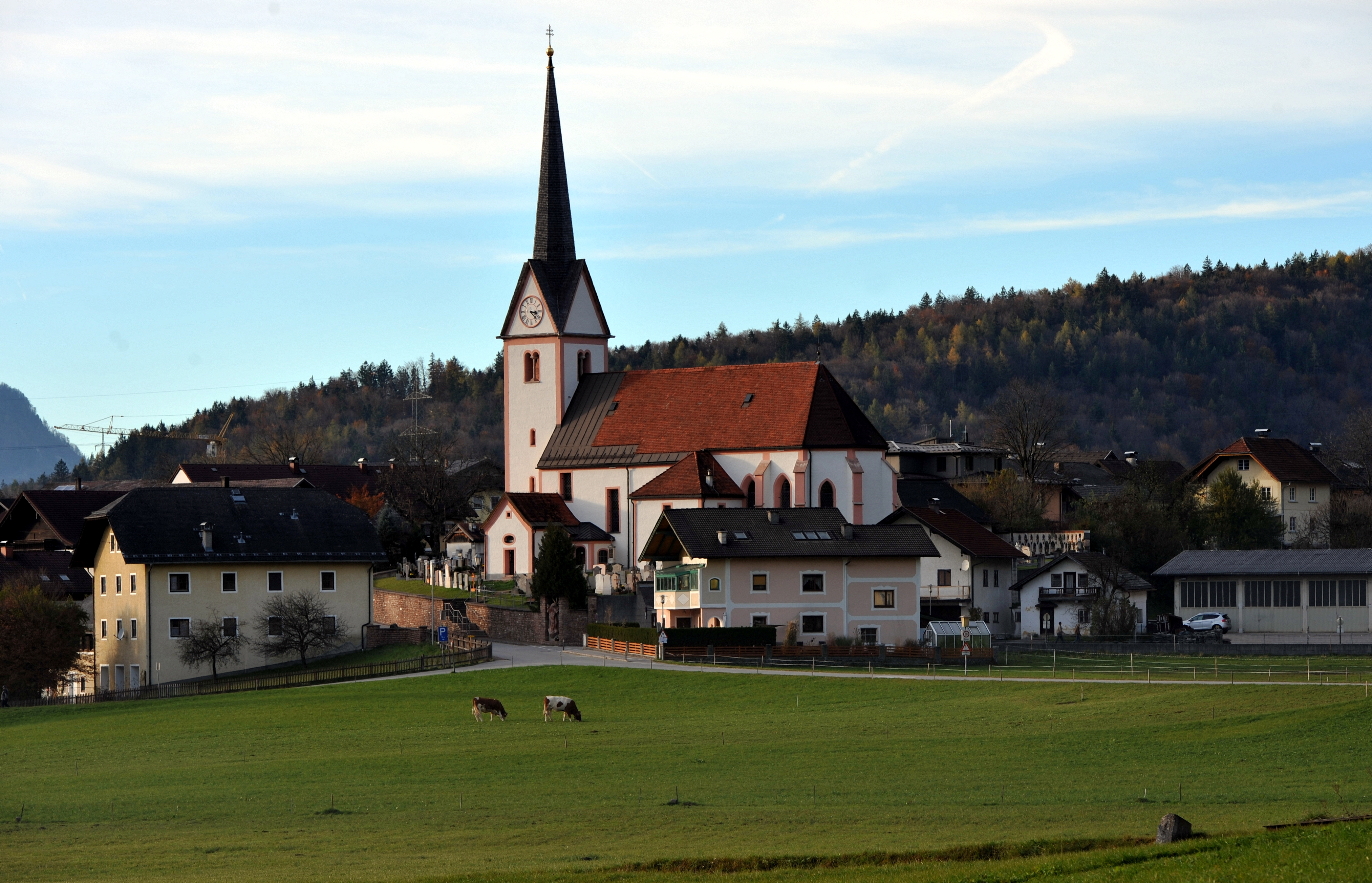 Kath. Pfarrkirche hl. Stephanus und Laurentius